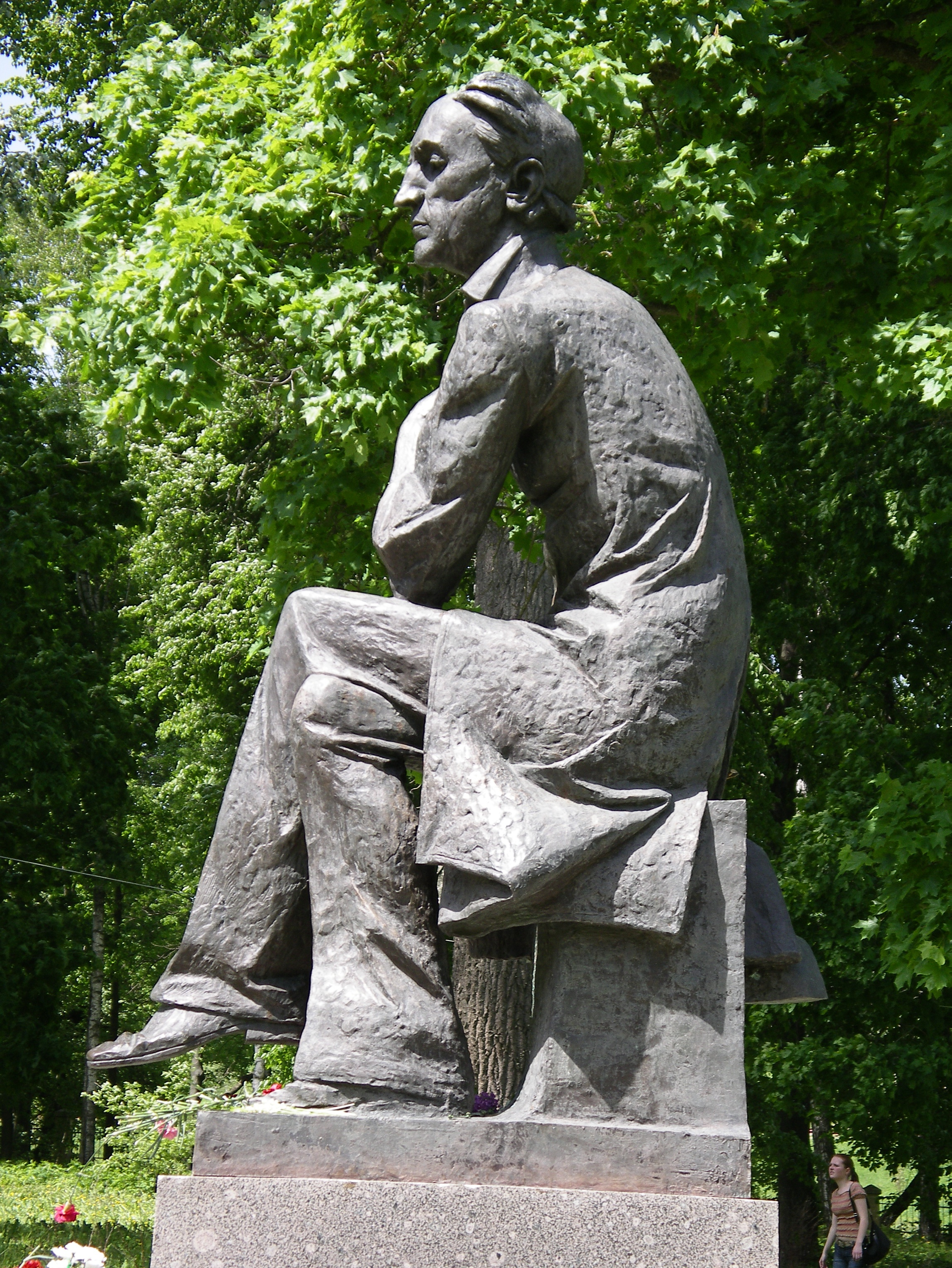 Памятник Тютчеву в музее-заповеднике "Овстуг"